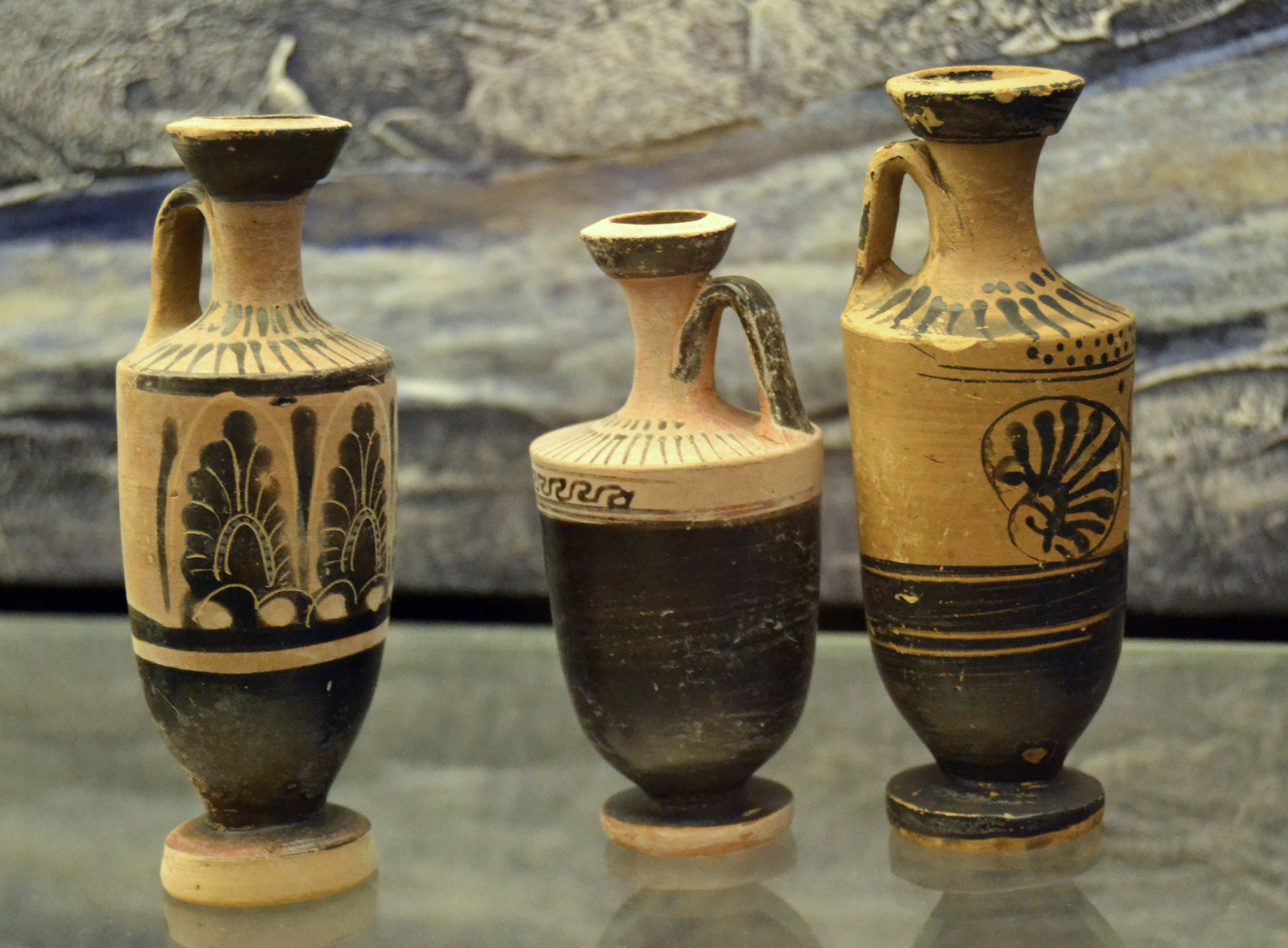 Lècits, segles V - IV aC Empúries, museu de Prehistòria de València.